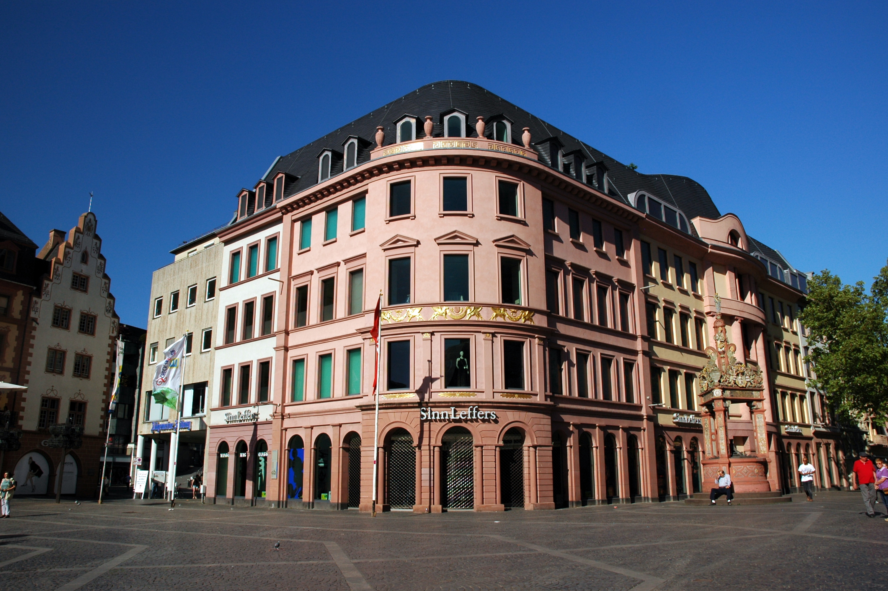 Mainz - SinnLeffers - Markt 19-29